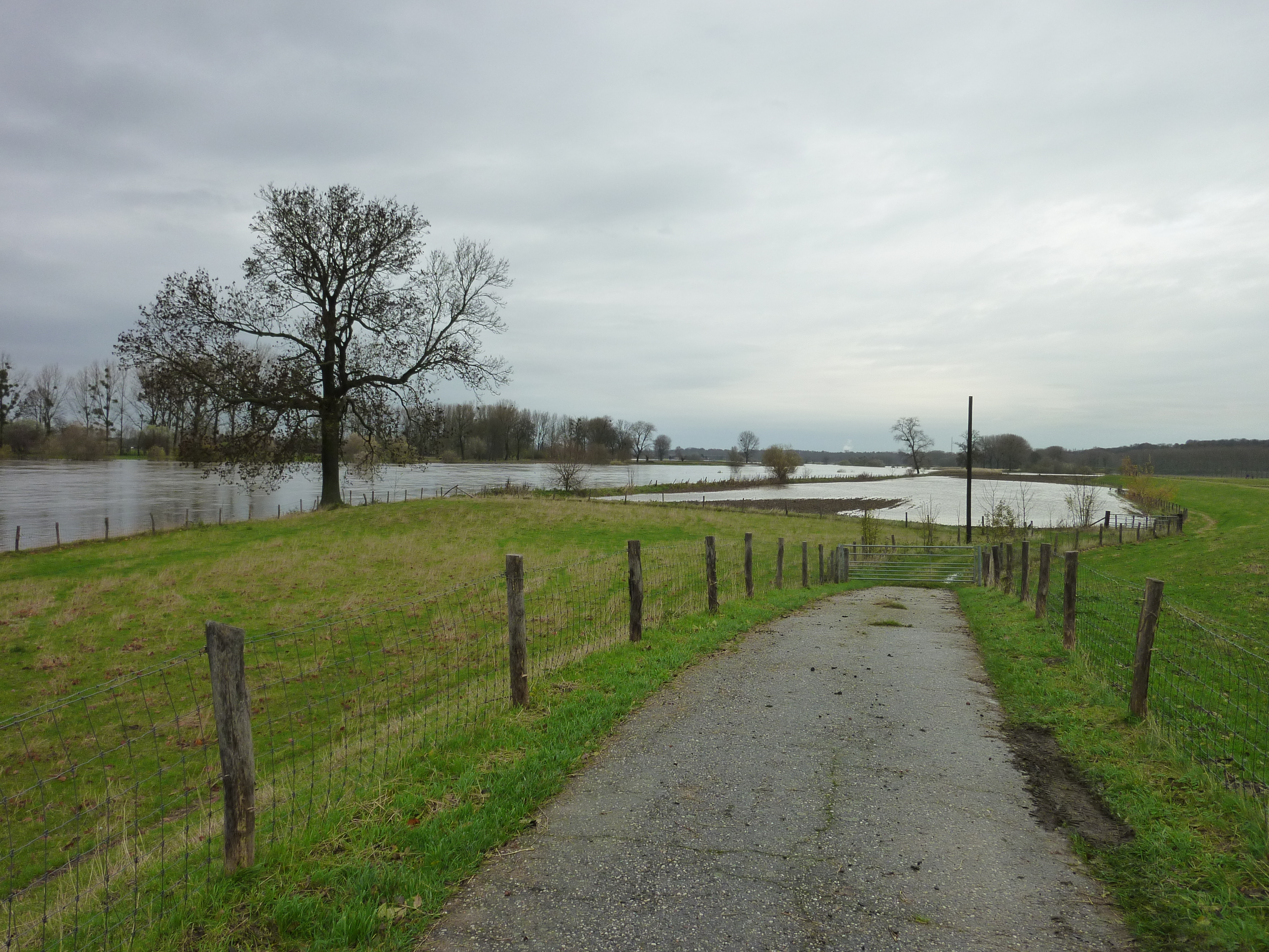 Uitzicht vanaf de dijk bij Geulle aan de Maas bij hoog water van de Maas.